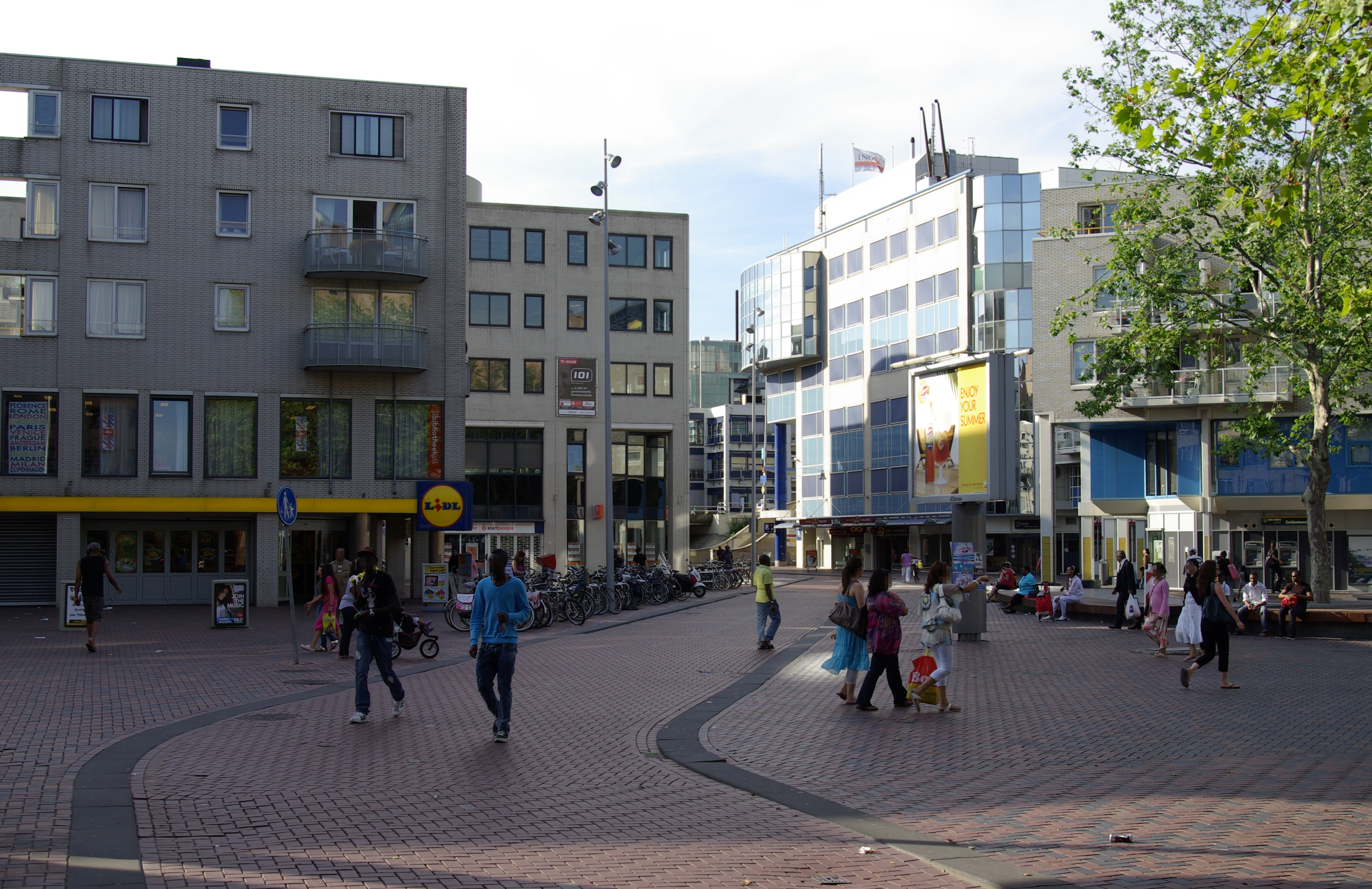 Winkelcentrum Amsterdamse Poort in Amsterdam Zuidoost